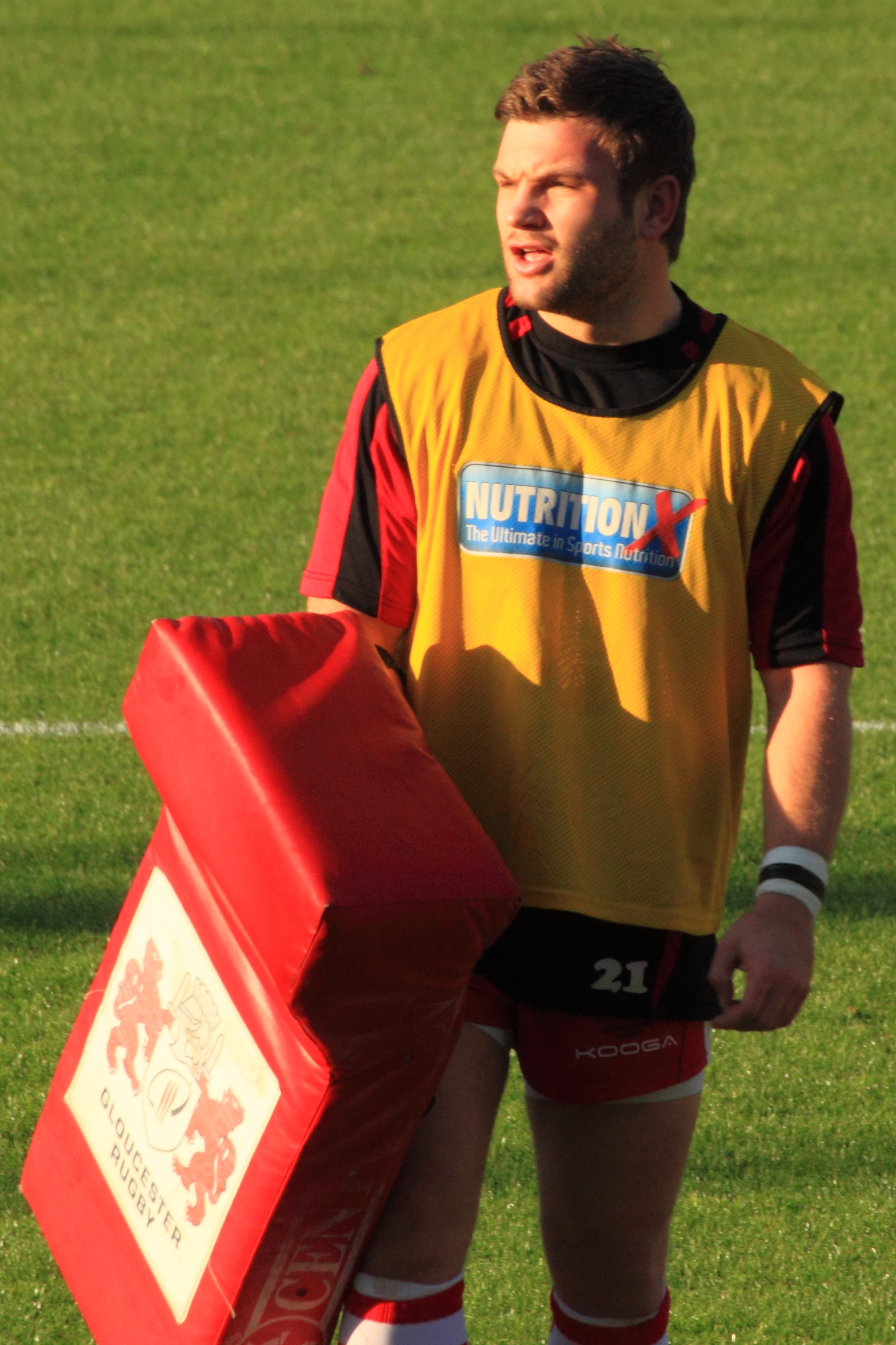 Heineken Cup — 13 November 2011, Stade Ernest Wallon. Match between: Stade toulousain — Gloucester Rugby